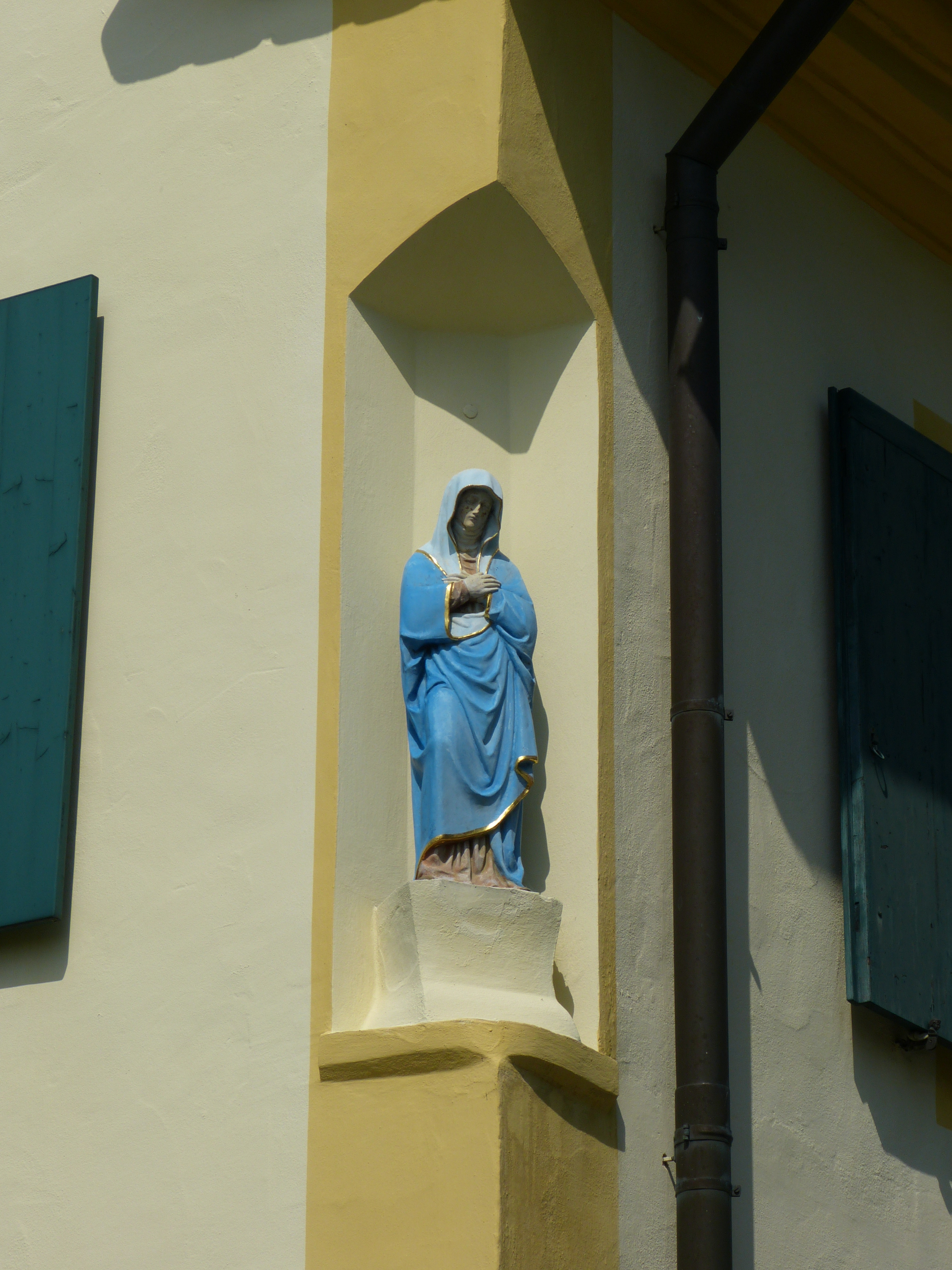 Pfarrhaus, Markt Wald, Landkreis Unterallgäu, Bayern, Deutschland